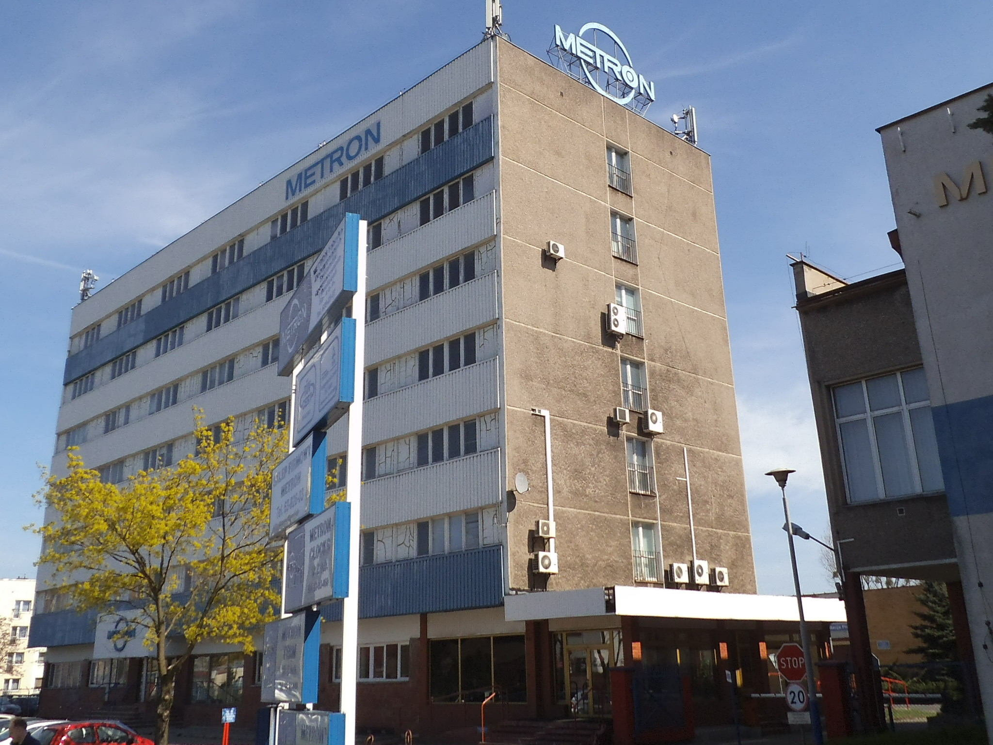 Metron w Toruniu